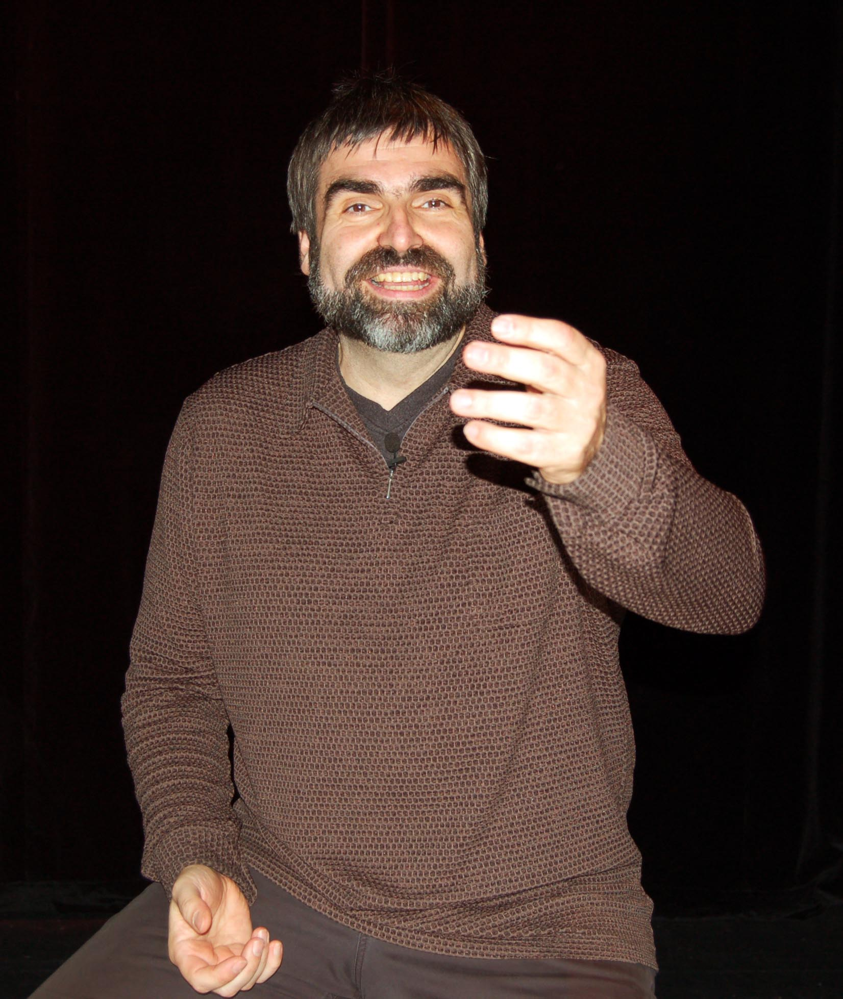 Volker Pispers bei seinem Programm "...bis neulich" im Haus der Stadt